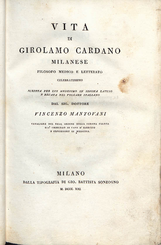 Vita di Girolamo Cardano milanese filosofo medico e letterato celebratissimo scritta per lui medesimo in idioma latino e recata nel volgare italiano dal Sig. dottore Vincenzo Mantovani .... - Milano : dalla tipografia di Gio. Battista Sonzogno, 1821. - XXXI, [1], 371, [1], 73, [1], 25, [3] p., [3] carte di tav. : ritratto ; 4º. - Contiene: Vita di Giambattista Vico scritta da lui medesimo ; Vita di Gabriello Chiabrera savonese da lui medesimo scritta . Frontespizio